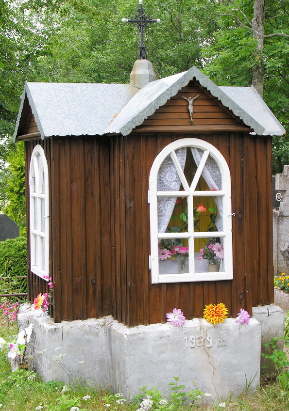 Koplytėlė Koplytėlė Dauginių kapinėse. Foto: Algirdas, 2006 m. liepos 18 d., Lietuva